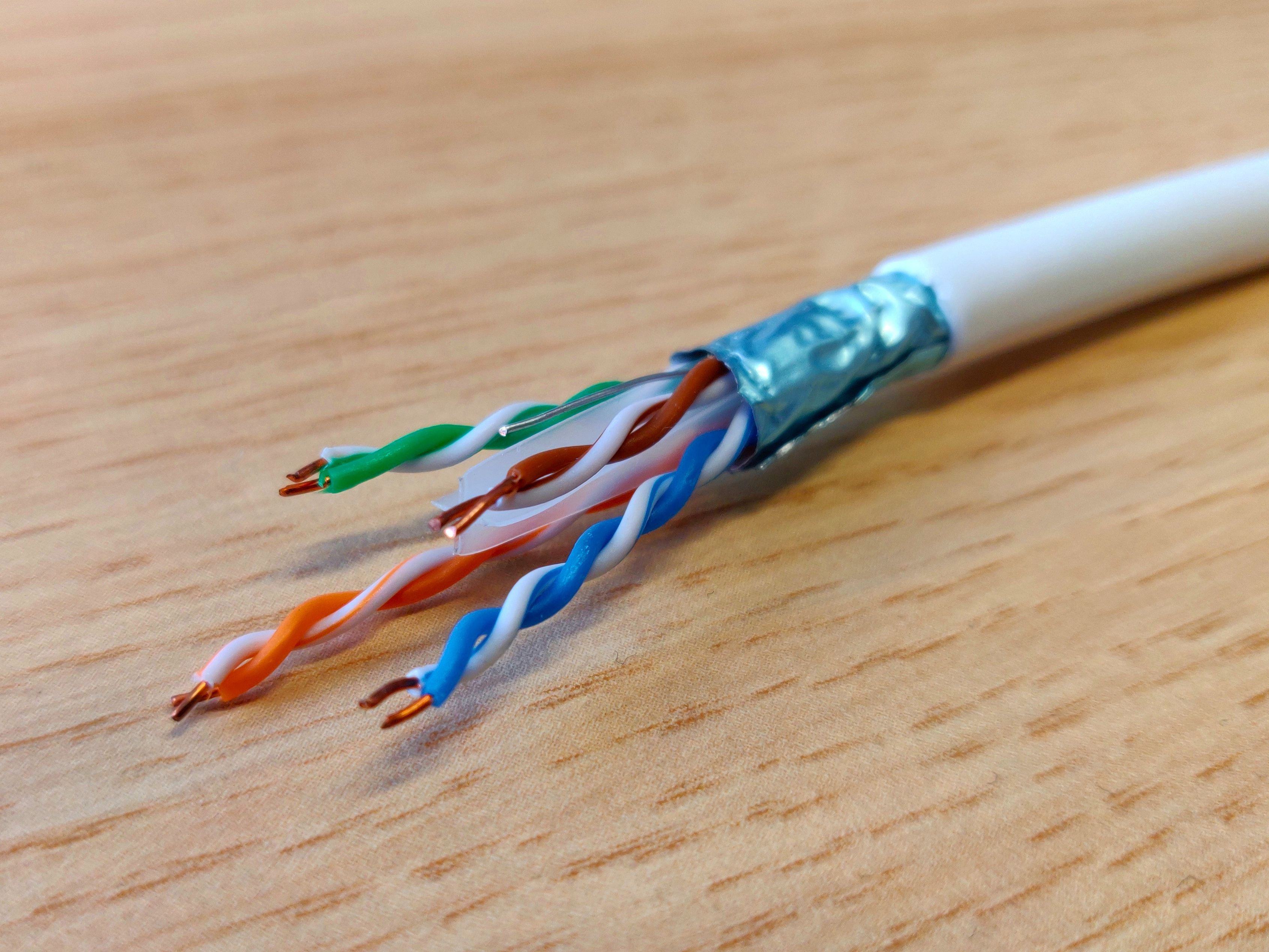 Cable F/UTP 4 paires torsadées